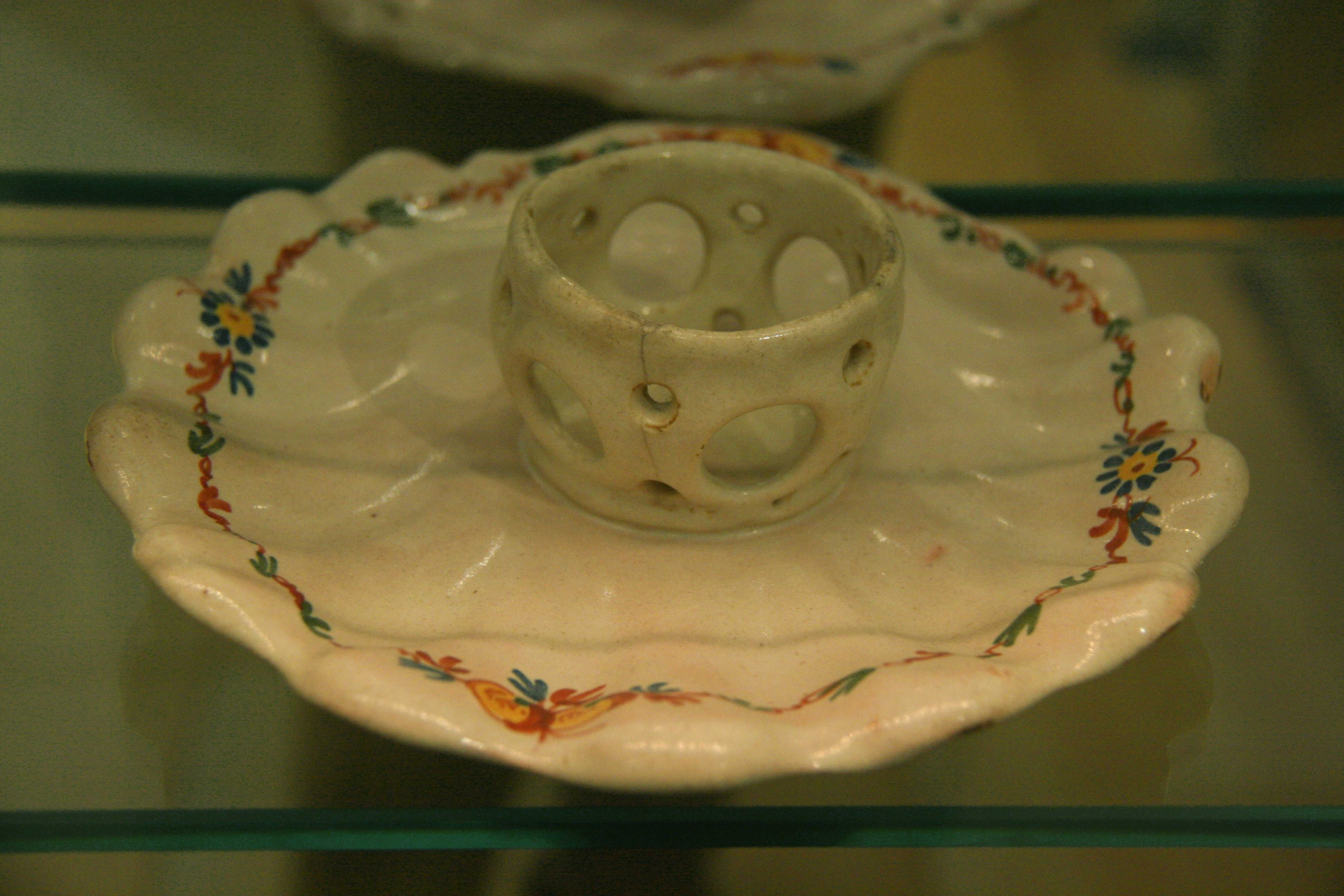 Macerina